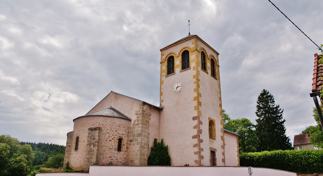 église St Pierre